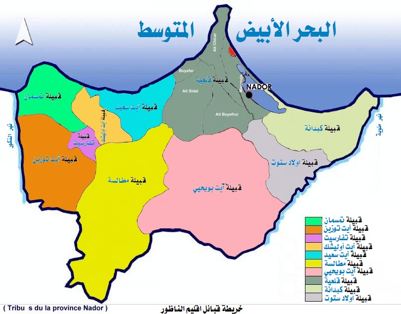 خريطة القبائل باقليم الناظور